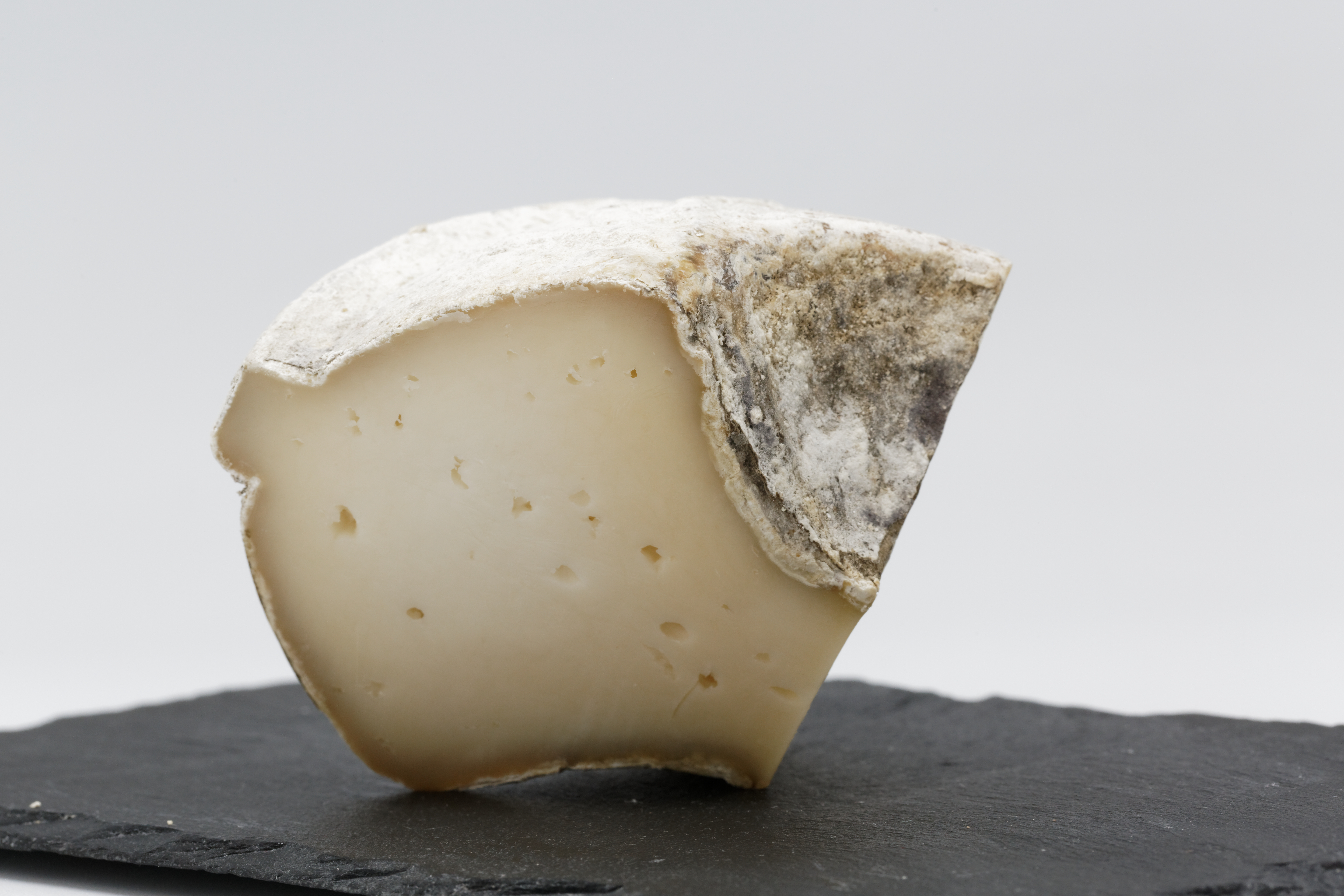 Le Troncho de Mayo, fromage espagnol de brebis au lait cru.